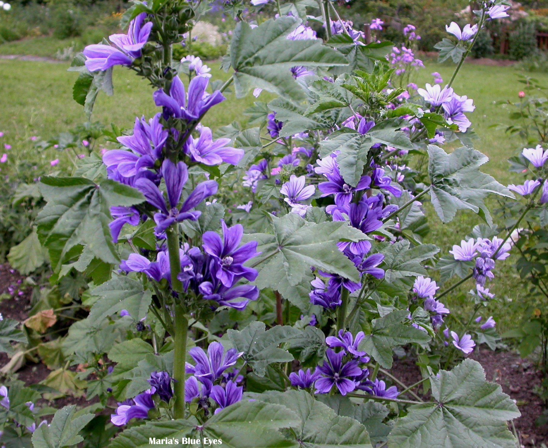 Malva Sylvestris 'Maria's Blue Eyes' dunkelblau blühend